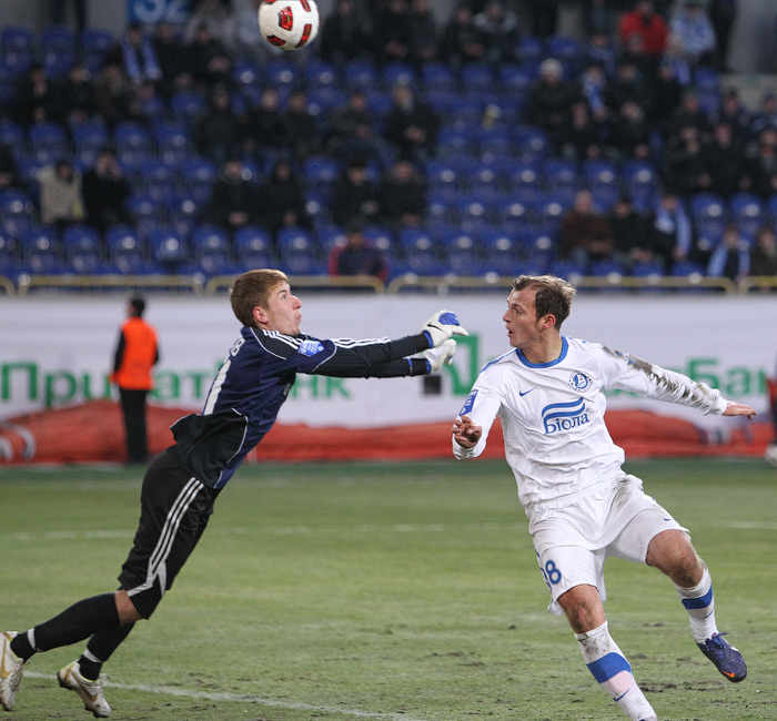 Алексей Казаков и Роман Зозуля в игре.